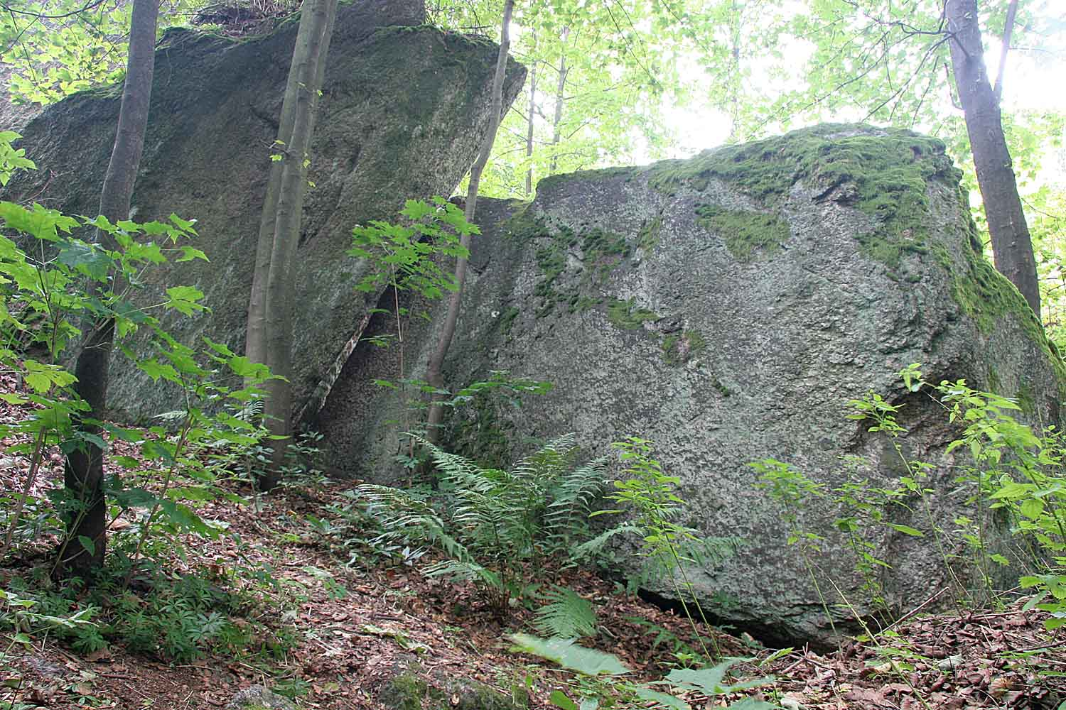 PP Štarkov, district Žďár nad Sázavou, Czech Republic autor:Prazak date:6. 9. 2006